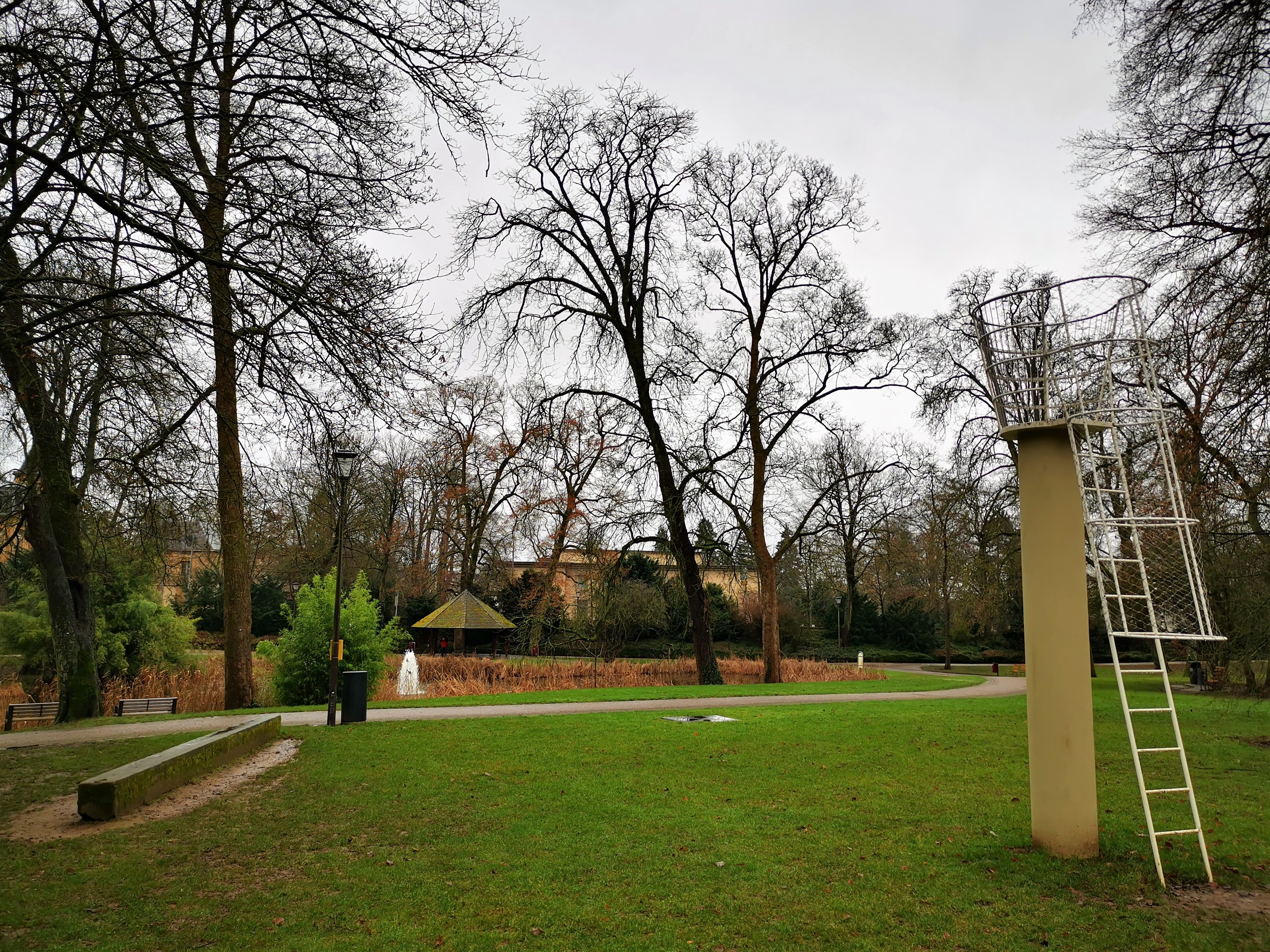 Luxembourg, l'installatioun "Stirner Prothese" de Bert Theis.